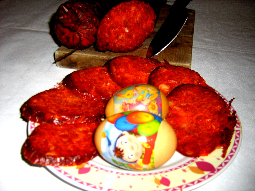 Kulen iz Bačkog Petrovca registrovan kao Petrovački kulen